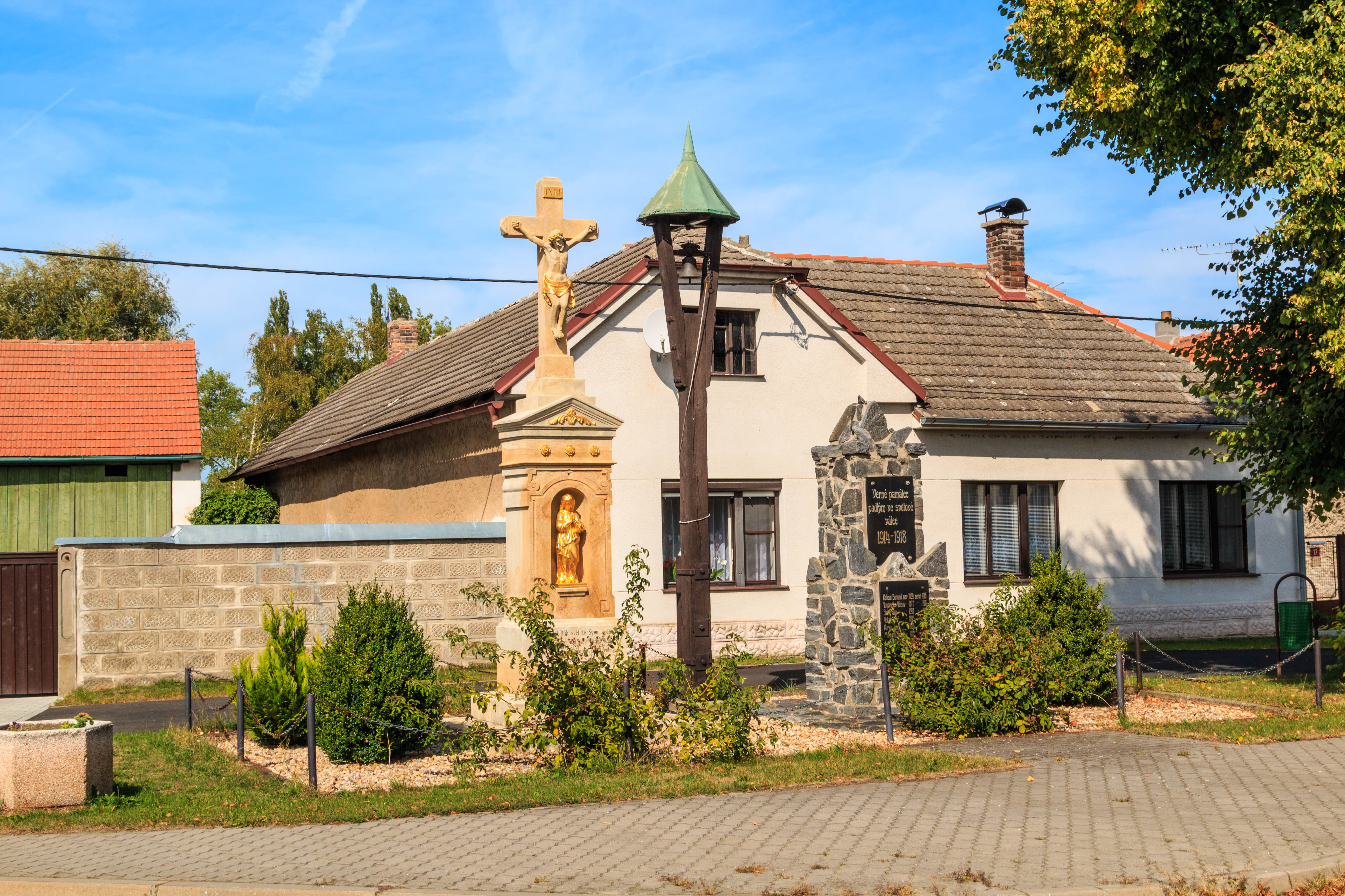 Foto českých obcí